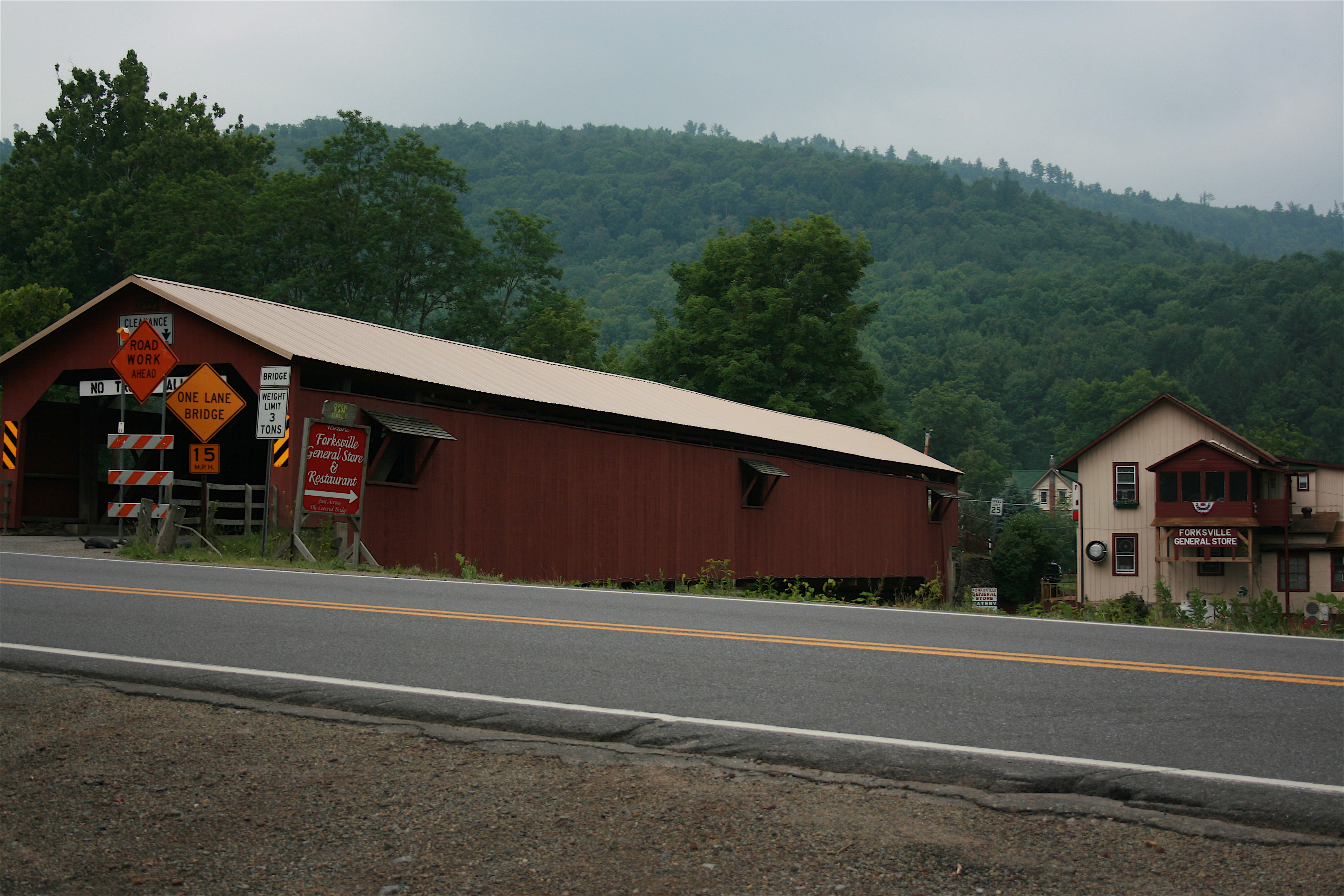 The 1850 Forksville Covered Bridge in Forskville, Sullivan County, Pennsylvania.